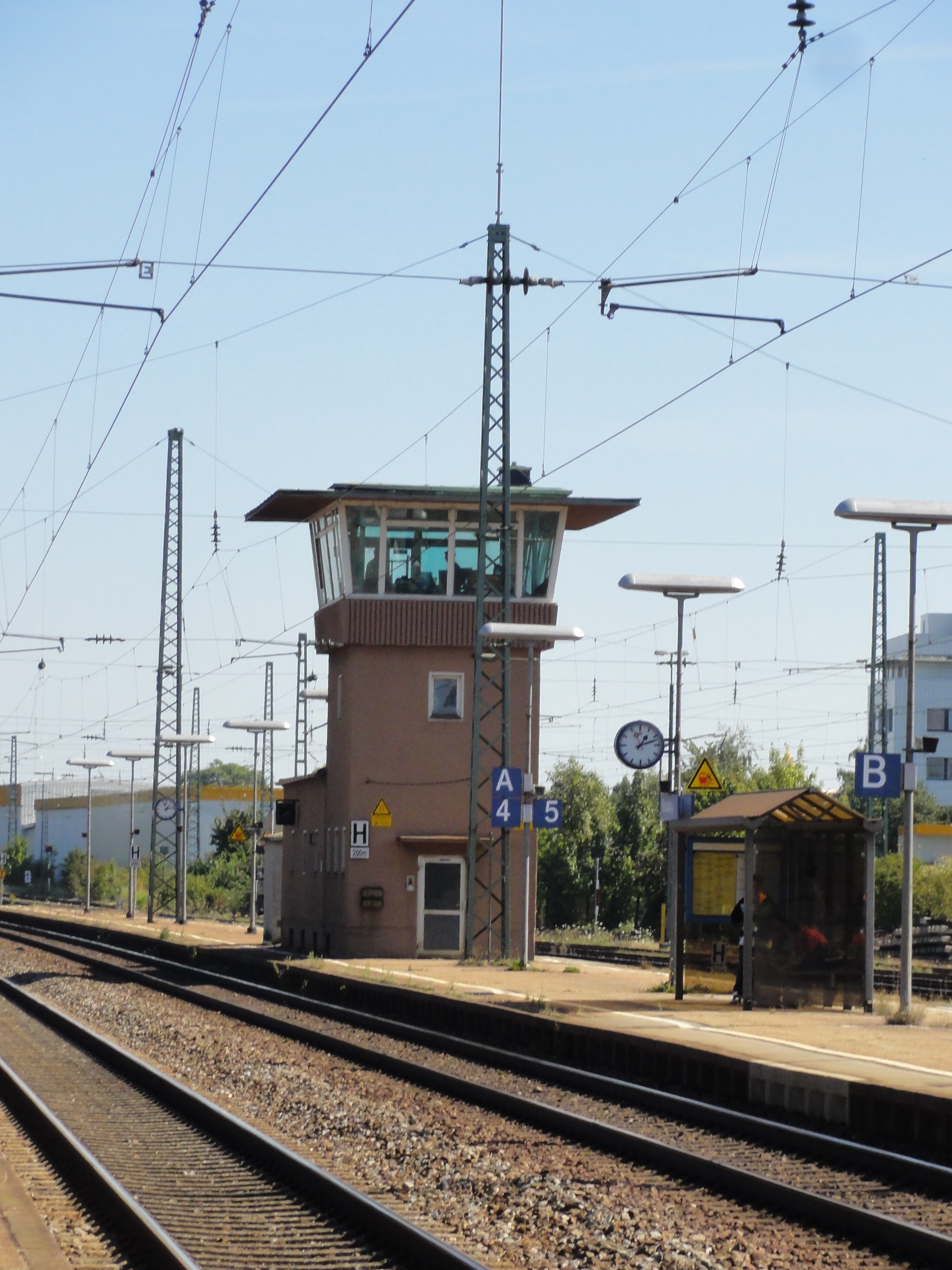 Straubing Hbf. (Stellwerk) Object location48° 52′ 35.98″ N, 12° 34′ 34.92″ E Info GPS data may be inaccurate. EXIF data regarding date and time may be inaccurate.